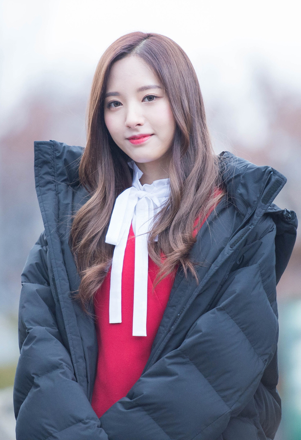 161223 뮤직뱅크 미니팬미팅 우주소녀 보나